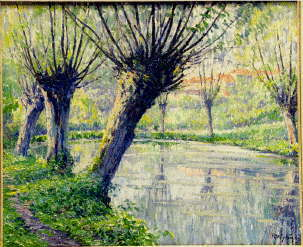 Rodolphe Wytsman (1860-1927): Weiden